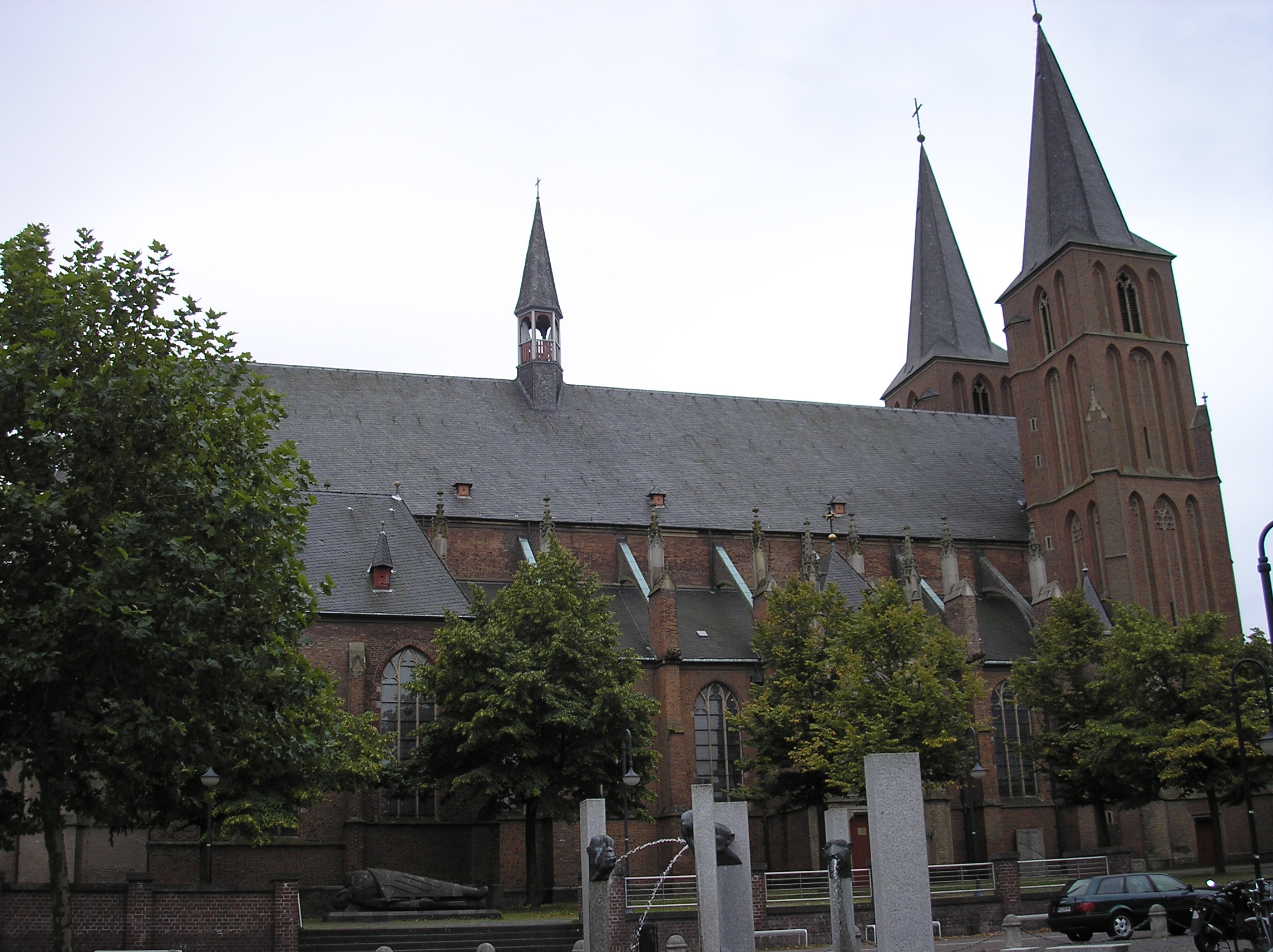 Propsteipfarr- und Stiftskirche St. Mariae Himmelfahrt im Stadtzentrum von Kleve, mit im Vordergrund Narrenbrunnen von Anette Mürdter und im Hintergrund Toter Krieger von Ewald Mataré